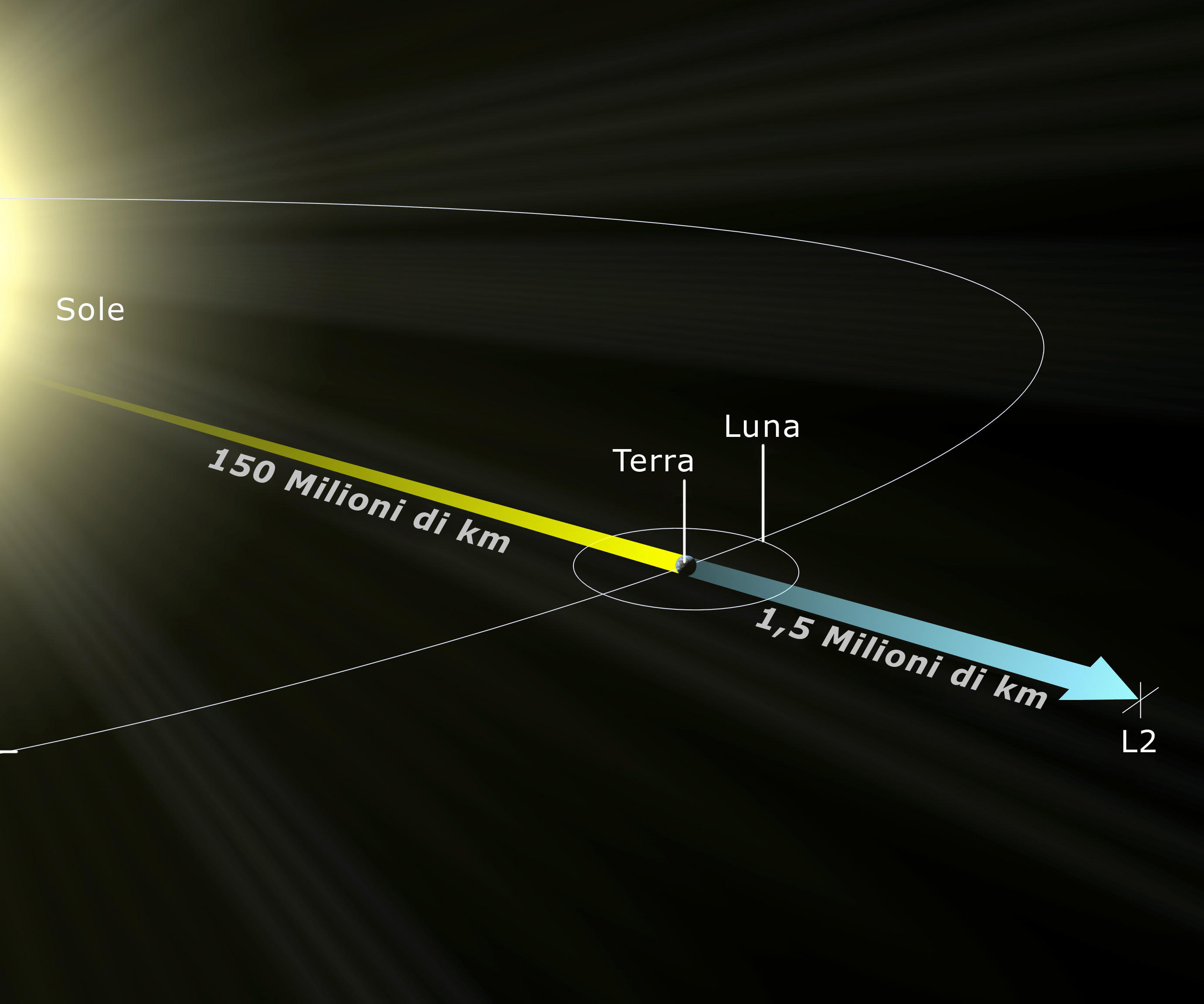 Orbita del telescopio spaziale James Webb